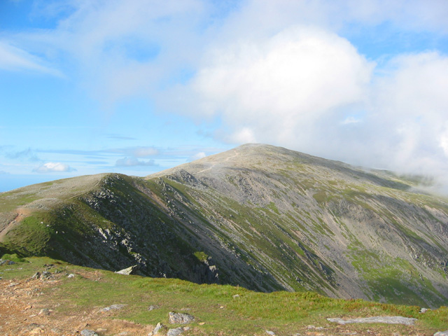 Carnedd Dafydd from the ridge towards Pen yr Ole Wen